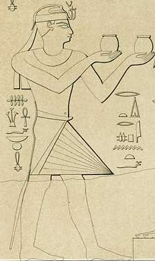 Der kuschitische König Schabaka in einer Darstellung aus Karnak